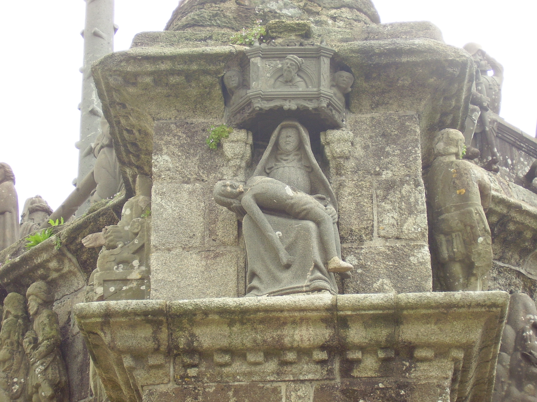 Pleyben, Pfarrbezirk mit monumentaler Calvaire und Kirche, Frankreich; Calvaire